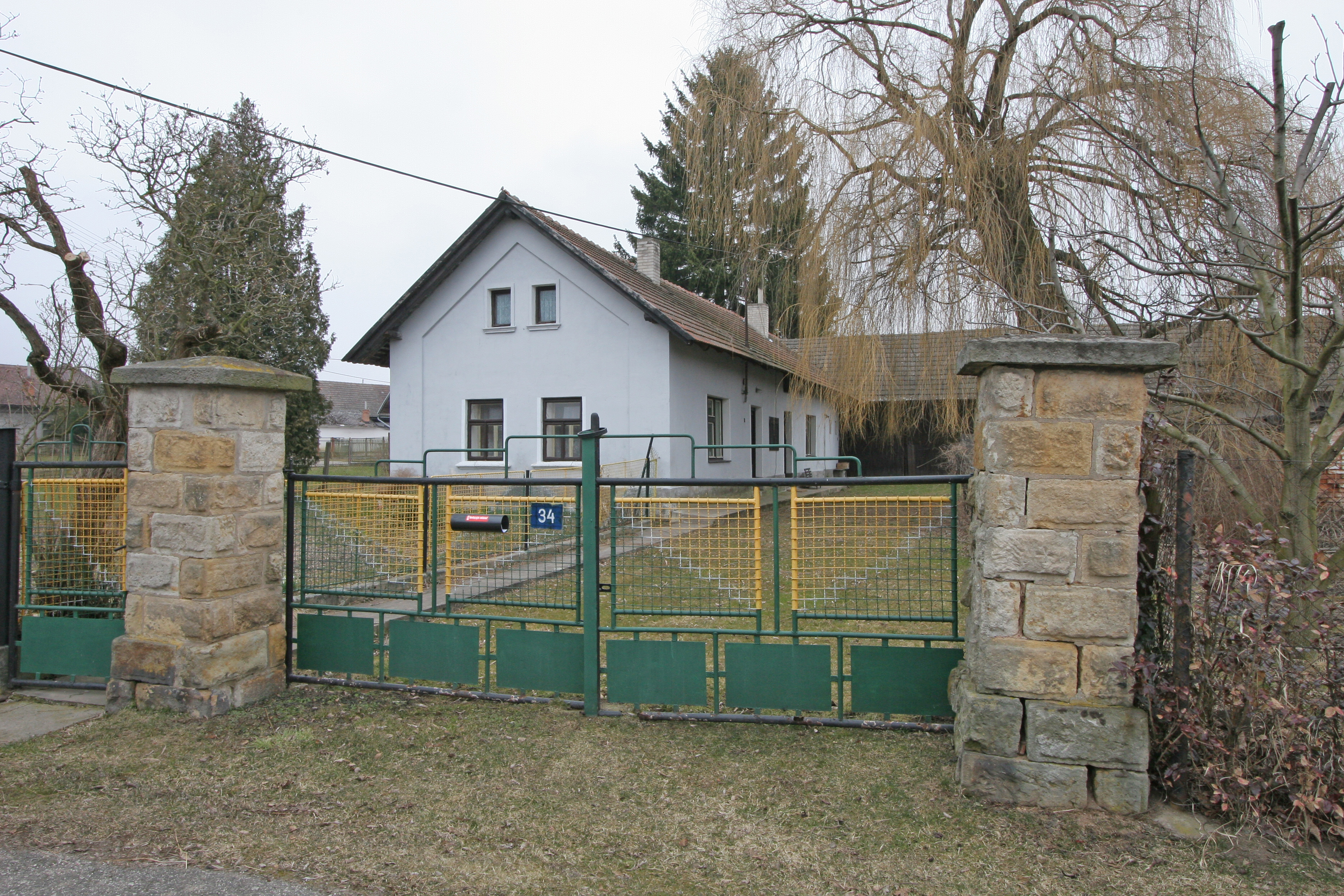 Bříšťany čp. 34